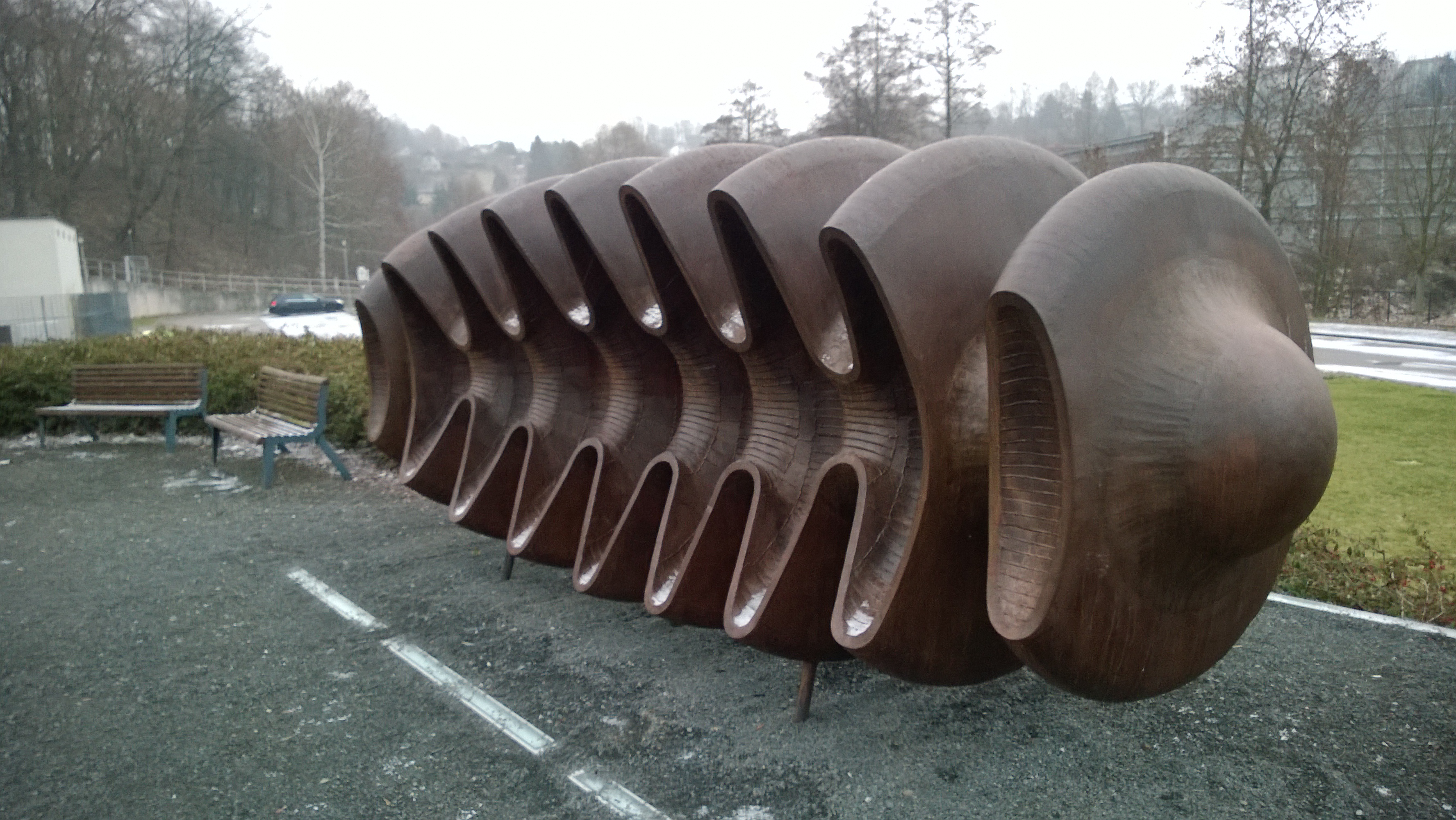 Realizace Tvar (pocta B. J. Horáčkovi), autor Jiří Kmošek, odhaleno 28. října 2012.